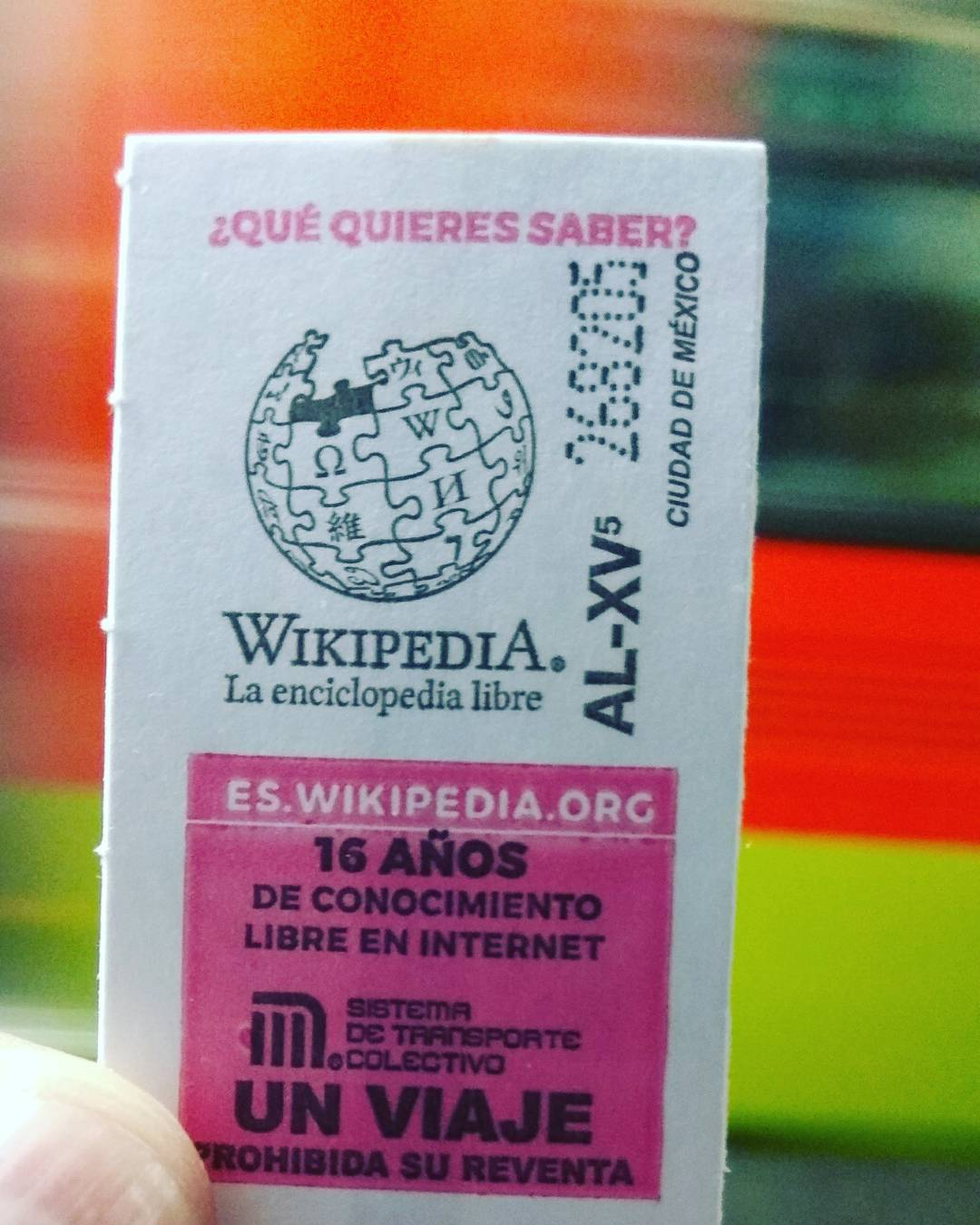 Boleto conmemorativo al 16 aniversario de Wikipedia emitido por el Sistema de Transporte Colectivo Metro de la Ciudad de México.